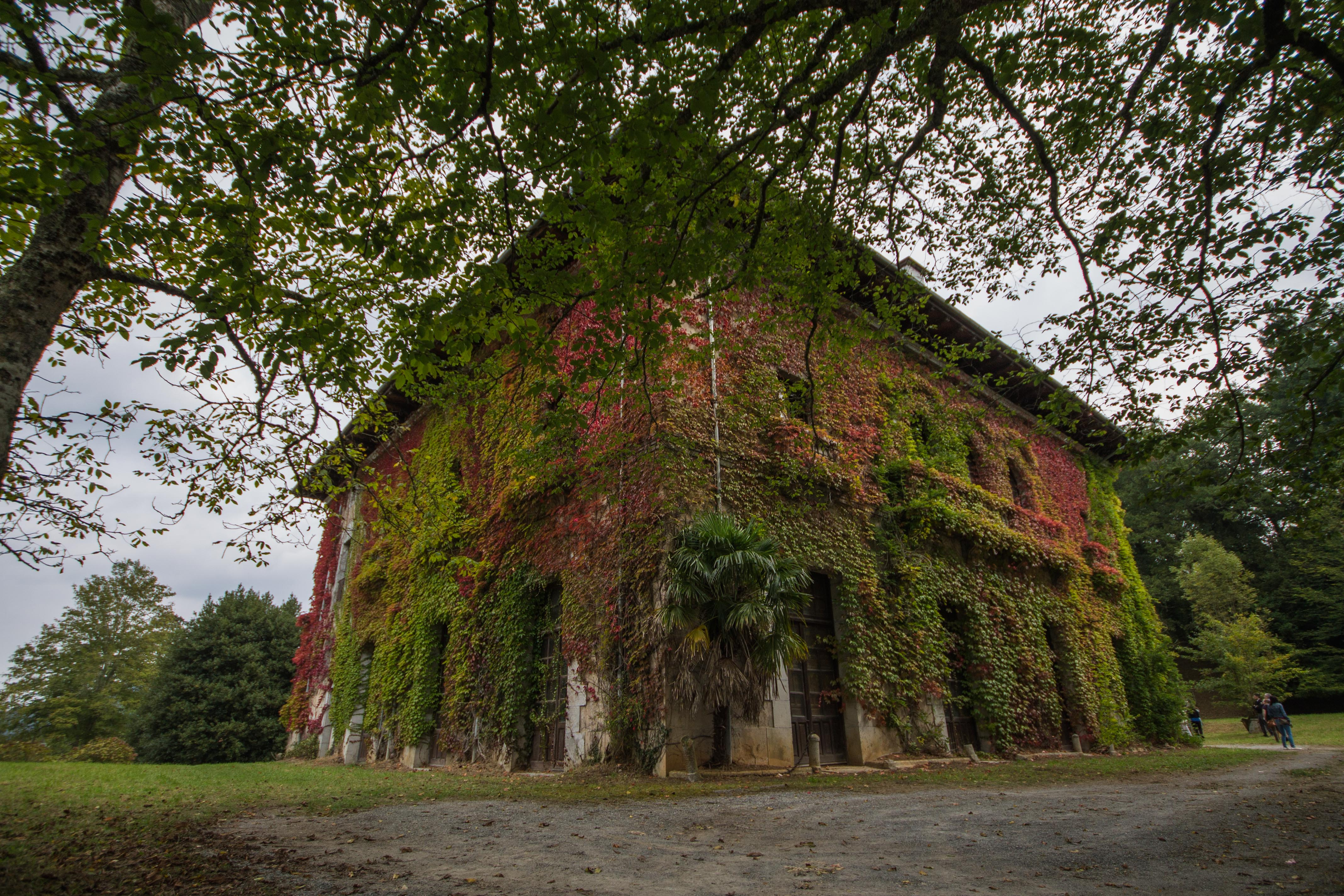 Etxebarria, Palacio Munibe